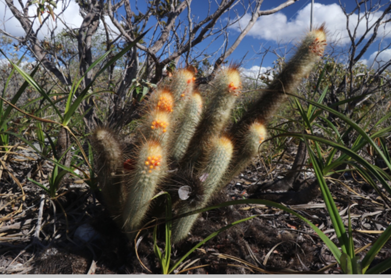 Micranthocereus flaviflorus Bahia Brasil